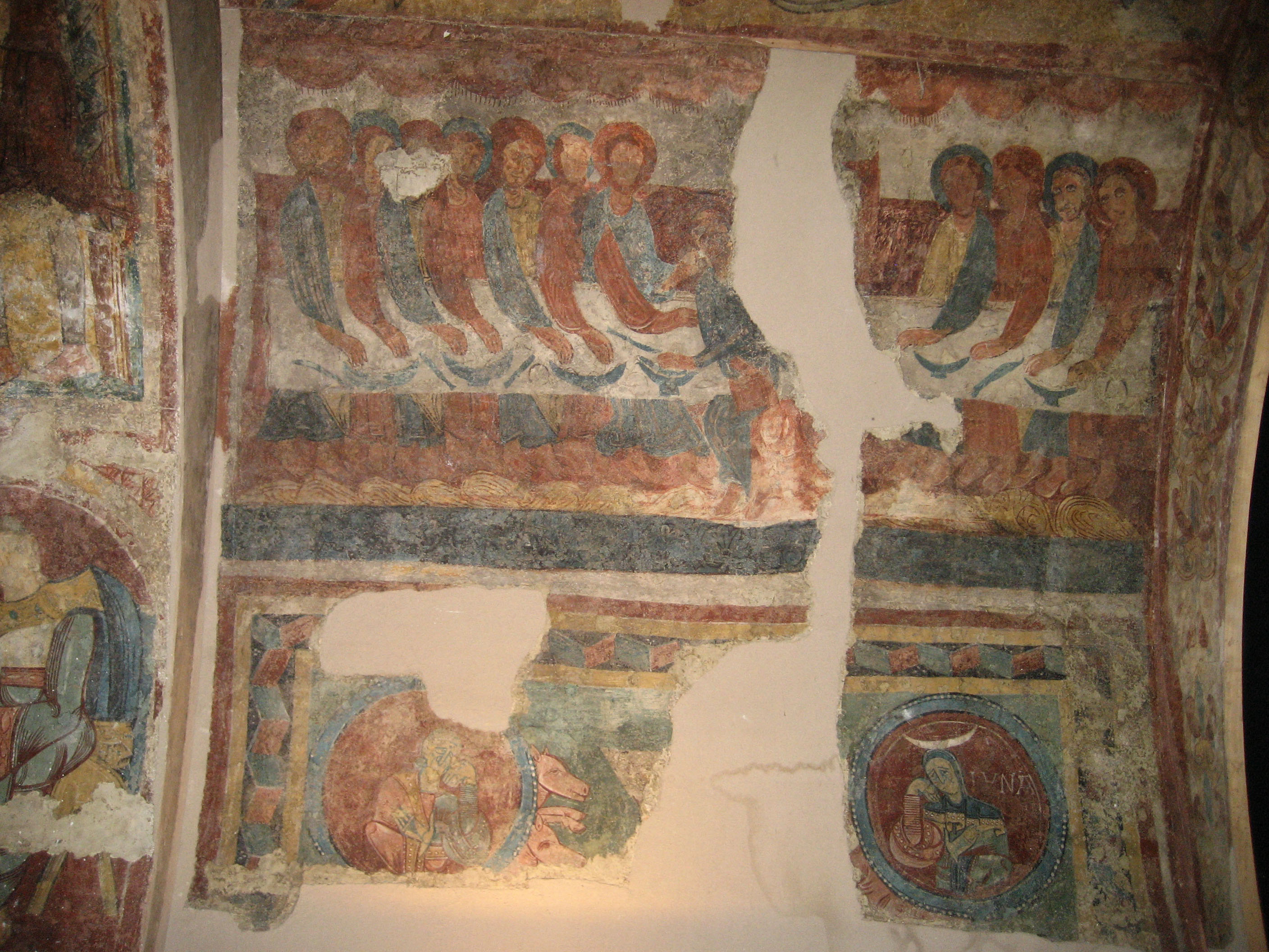 Fresco de la iglesia de Sant Andreu de Baltarga en la comarca catalana de la Baja Cerdaña (Spain)